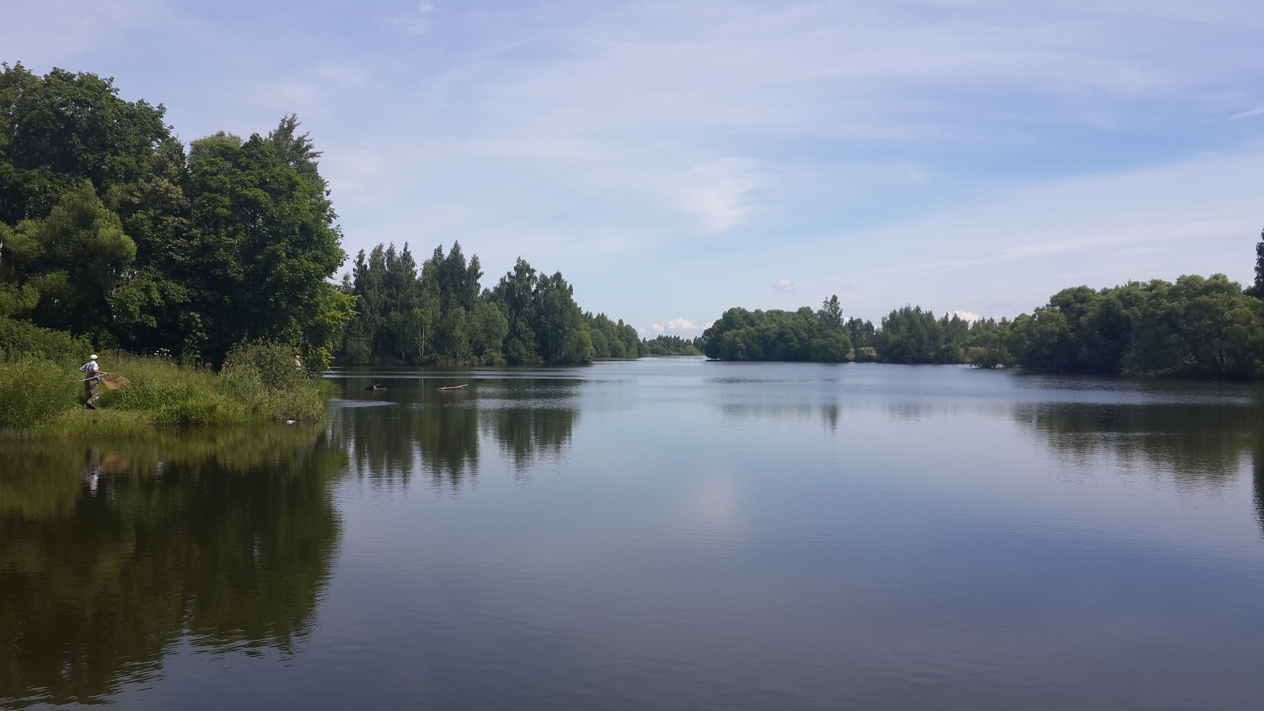 Река Крутица 2017 г.